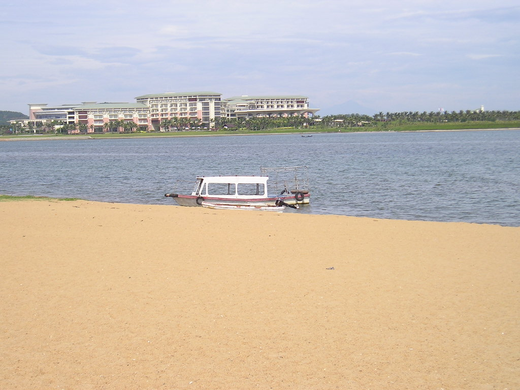 博鳌